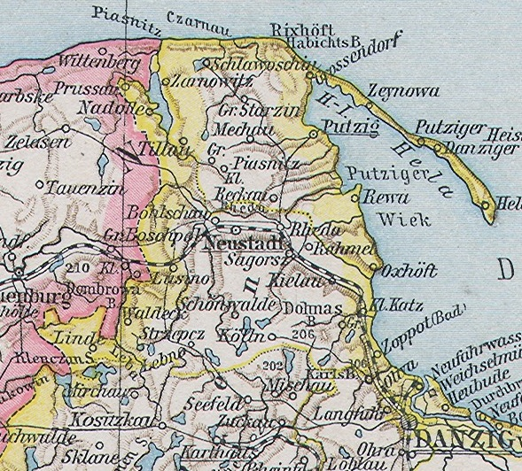 Kreis Neustadt in Westpreußen, Ausschnitt aus